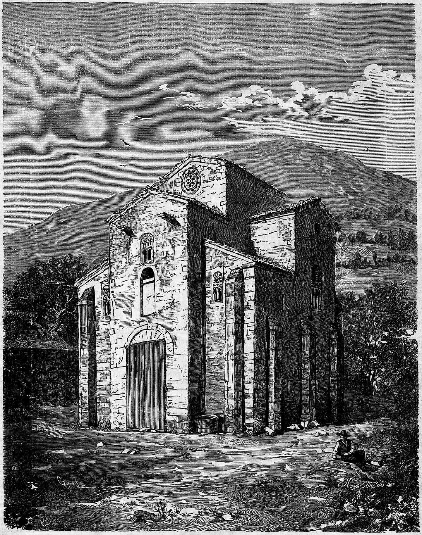 Facha de la iglesia de San Miguel de Lillo, en la revista española La Ilustración de Galicia y Asturias.